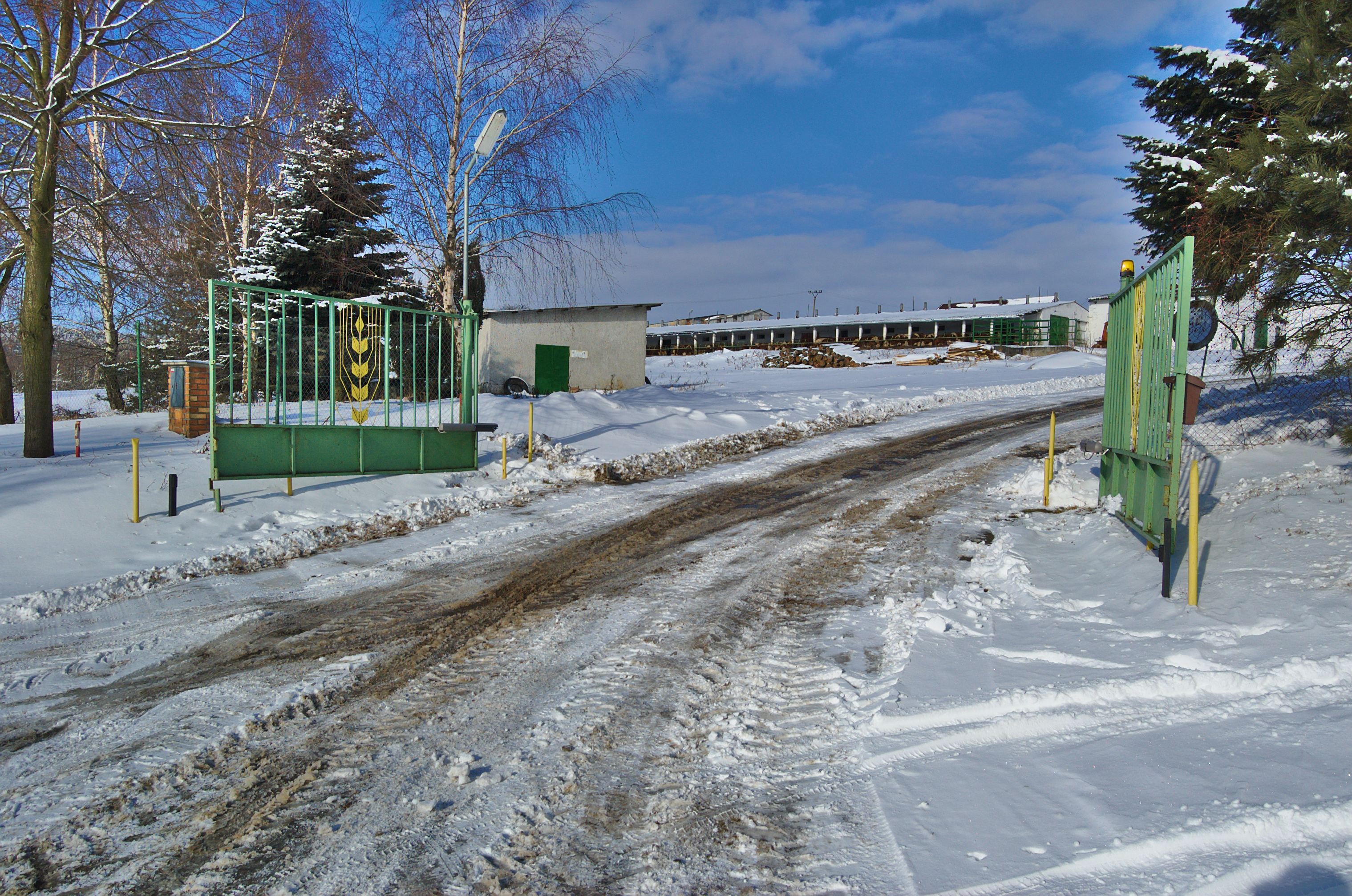 Zemědělské družstvo Lipová, okres Prostějov